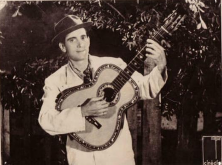 O cantor brasileiro Francisco Alves (ou Chico Viola) em fotografia promocional publicada em 1944 do filme da Cinédia, "Berlim na Batucada".